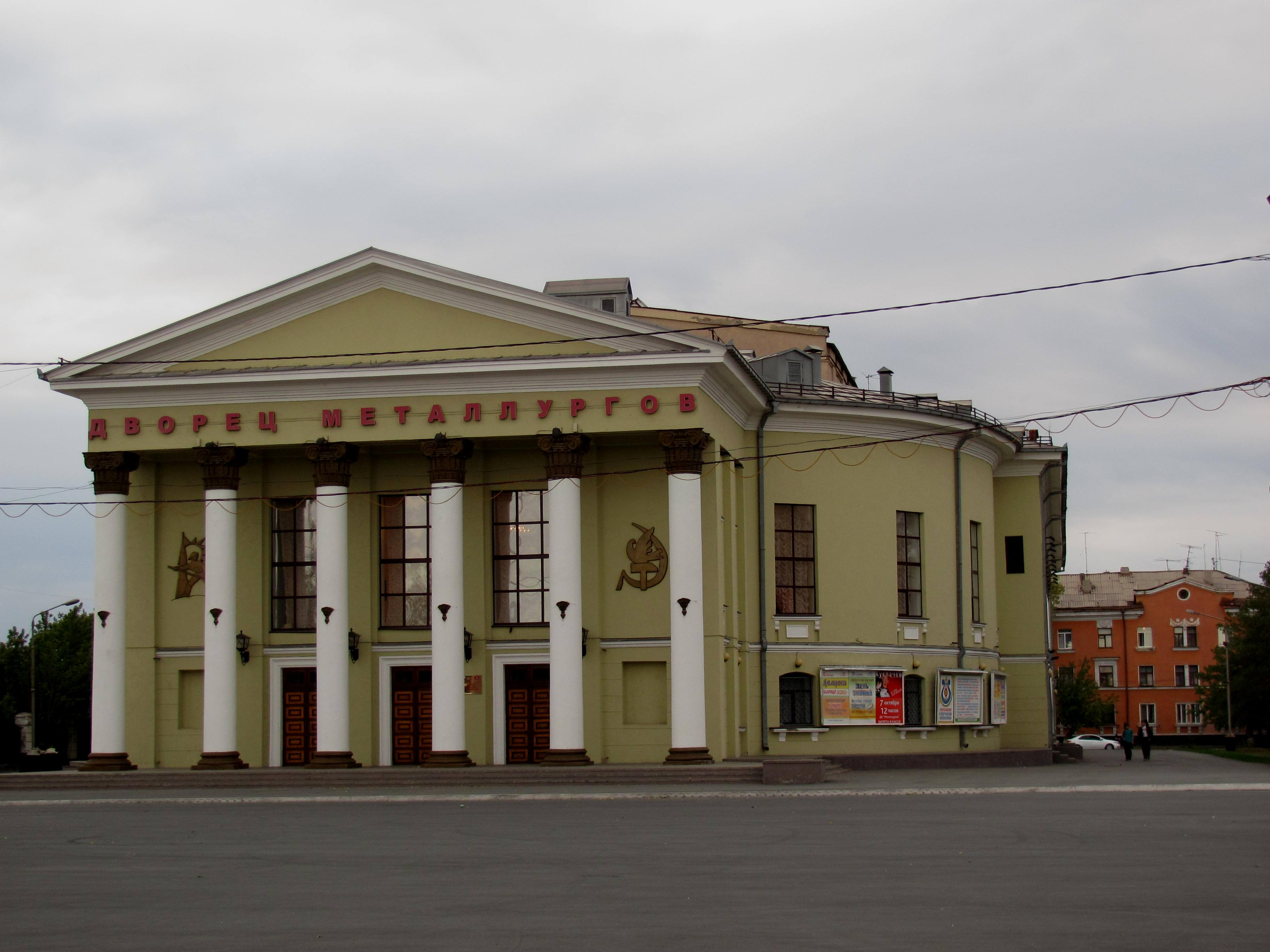 ДК в центре Новотроицка